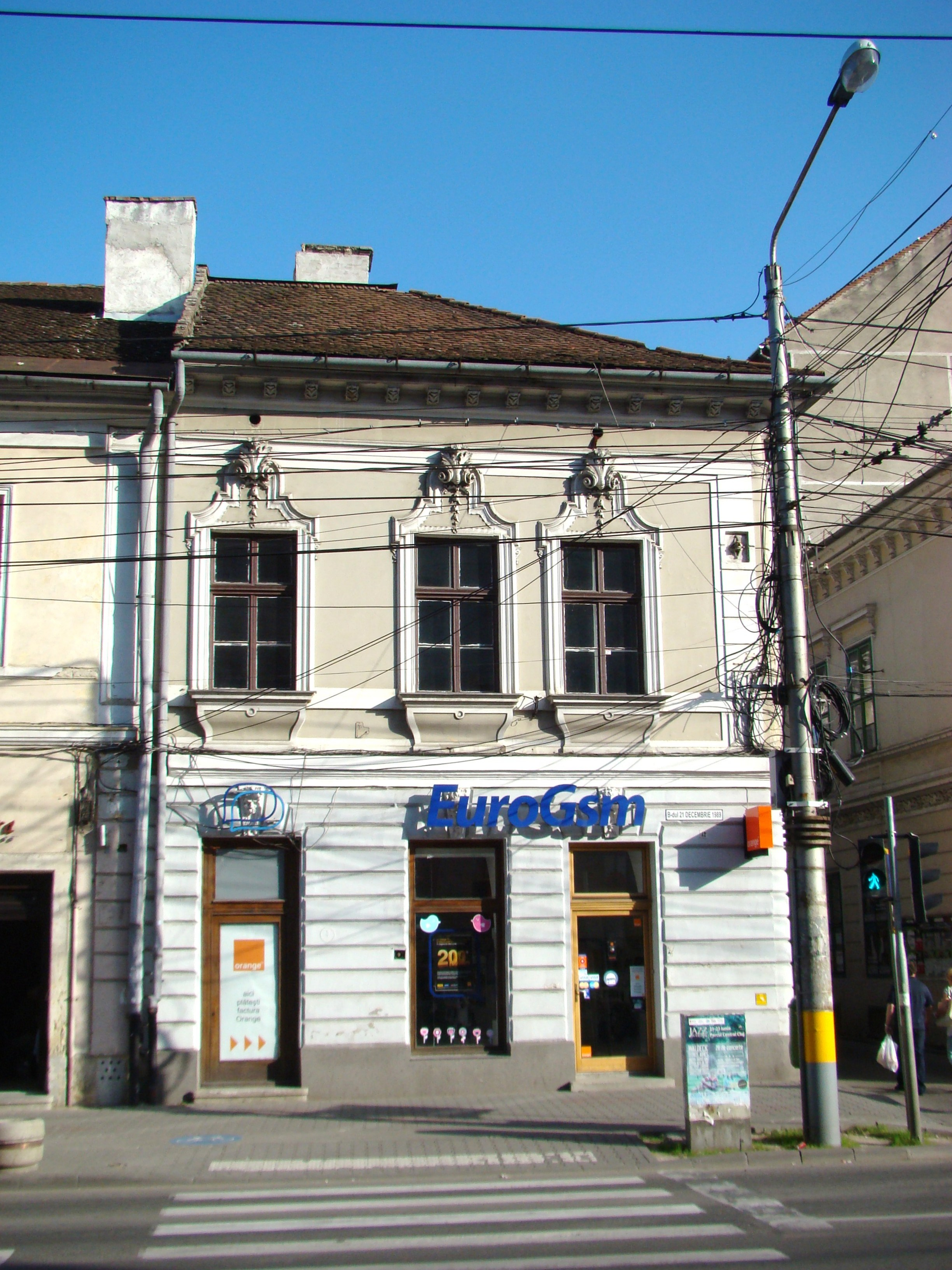 Casă, monument istoric, Bd.21 Decembrie 1989, nr.12